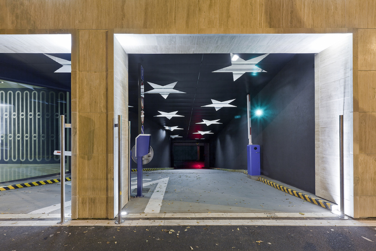 BGS vjazd